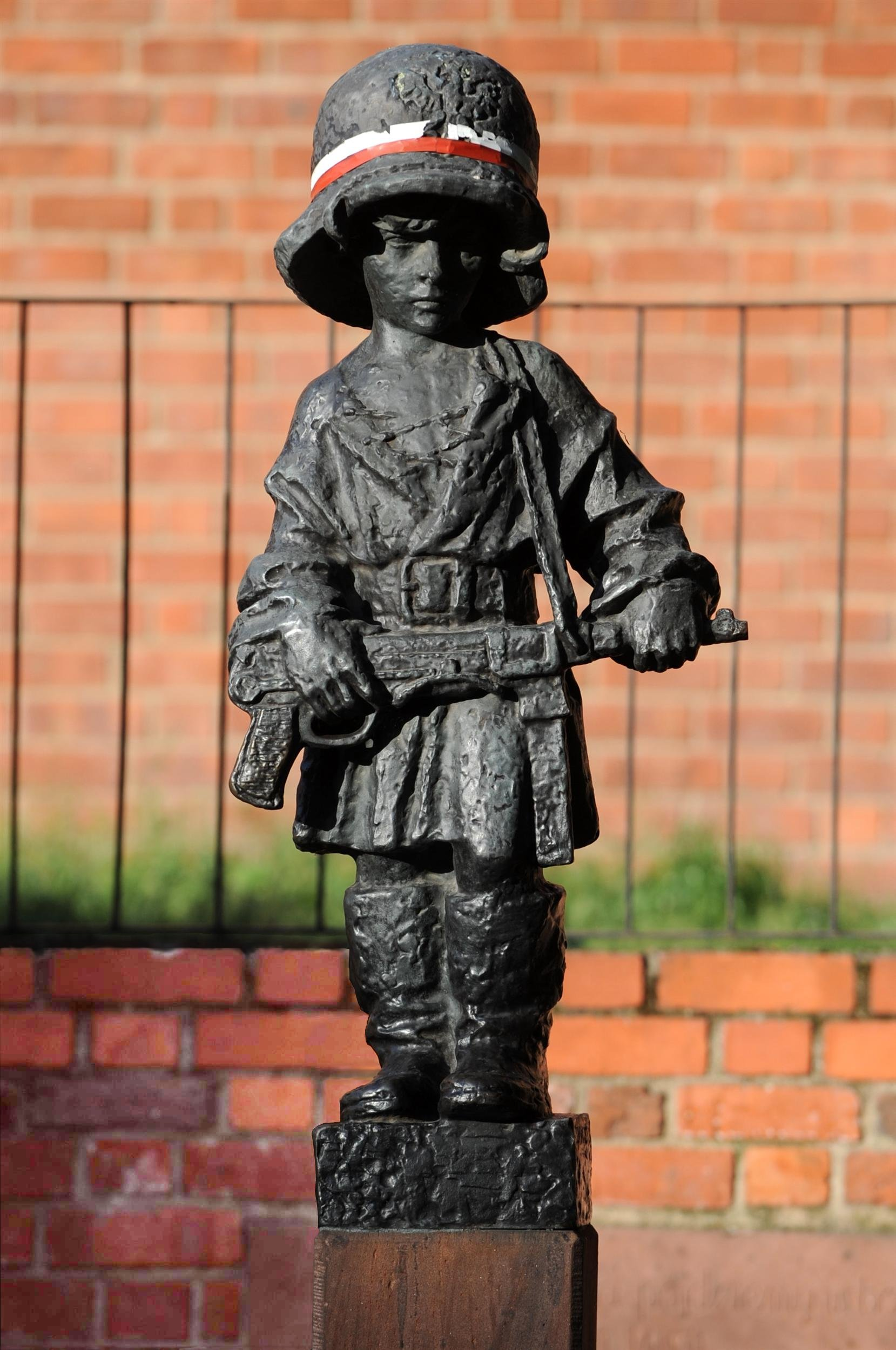 Pomnik Małego Powstańca w Warszawie